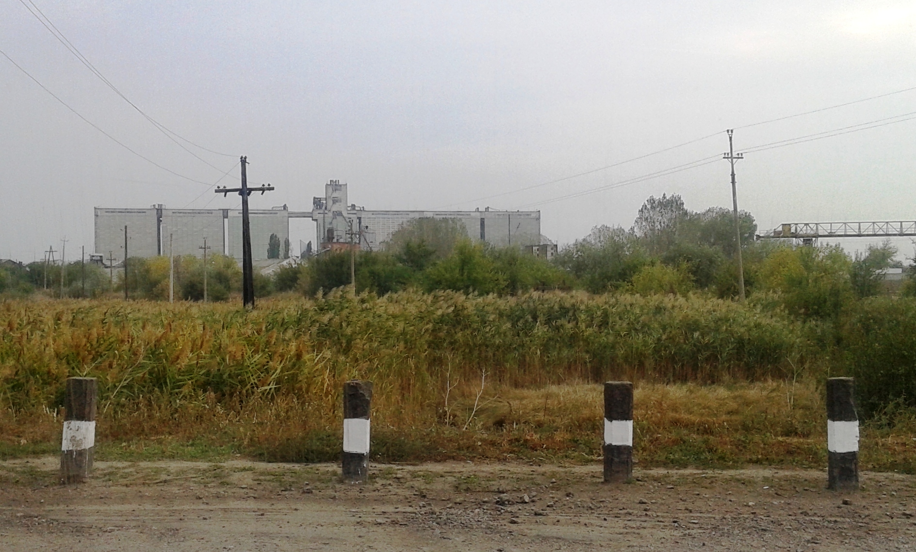 Вікіекспедиція у Буджак